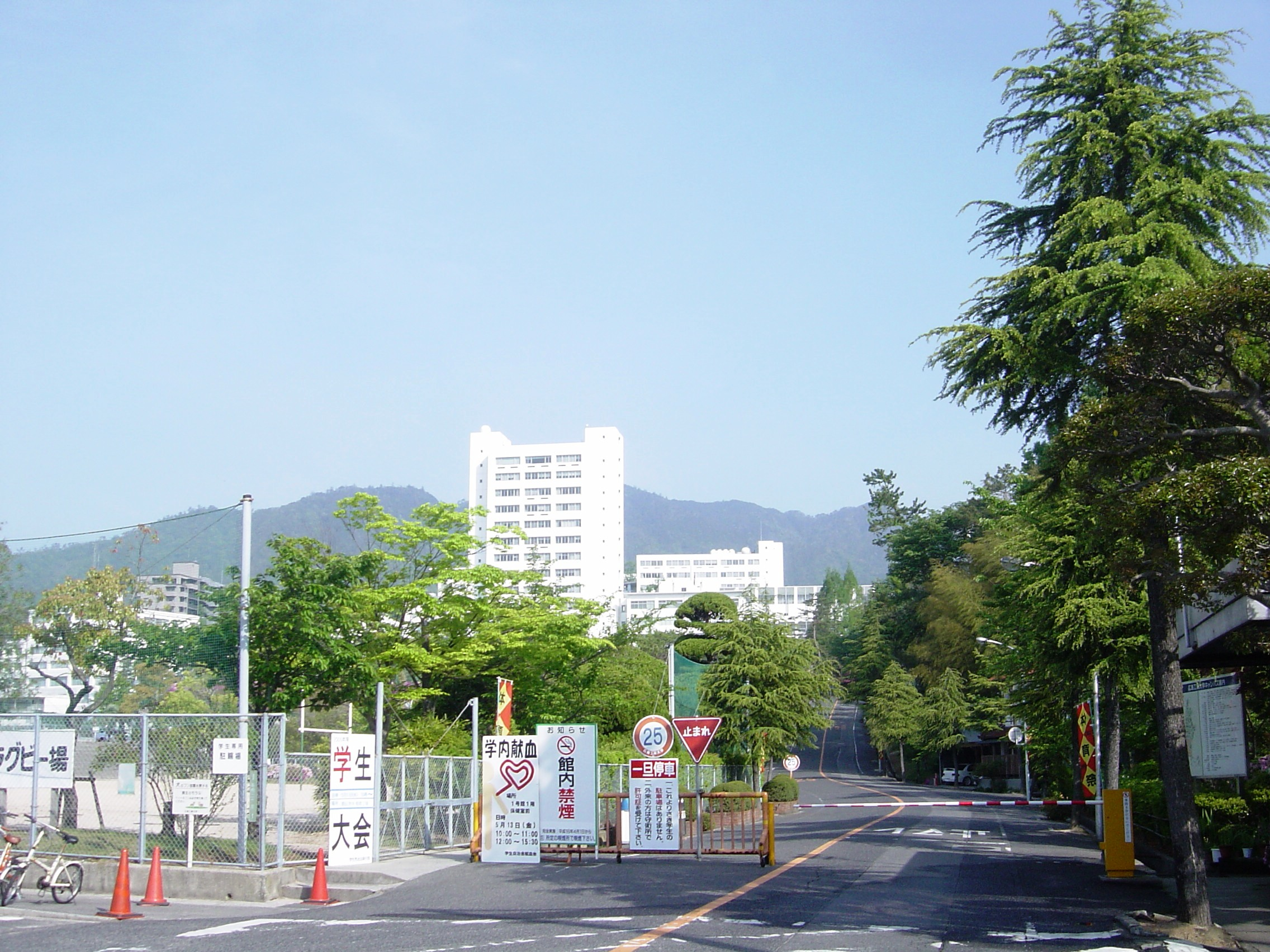 広島工業大学